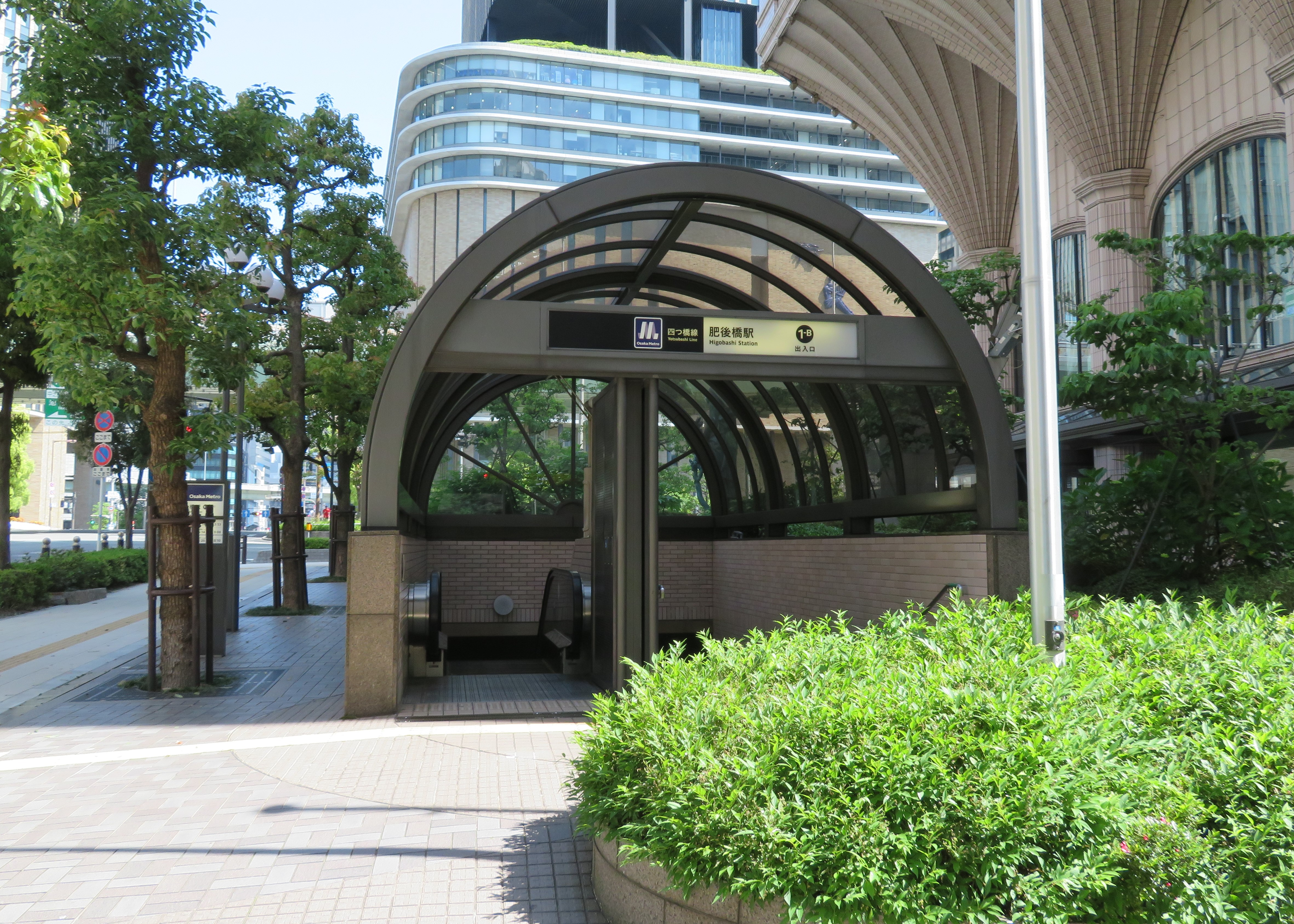 大阪市高速電気軌道 (Osaka Metro) 肥後橋駅